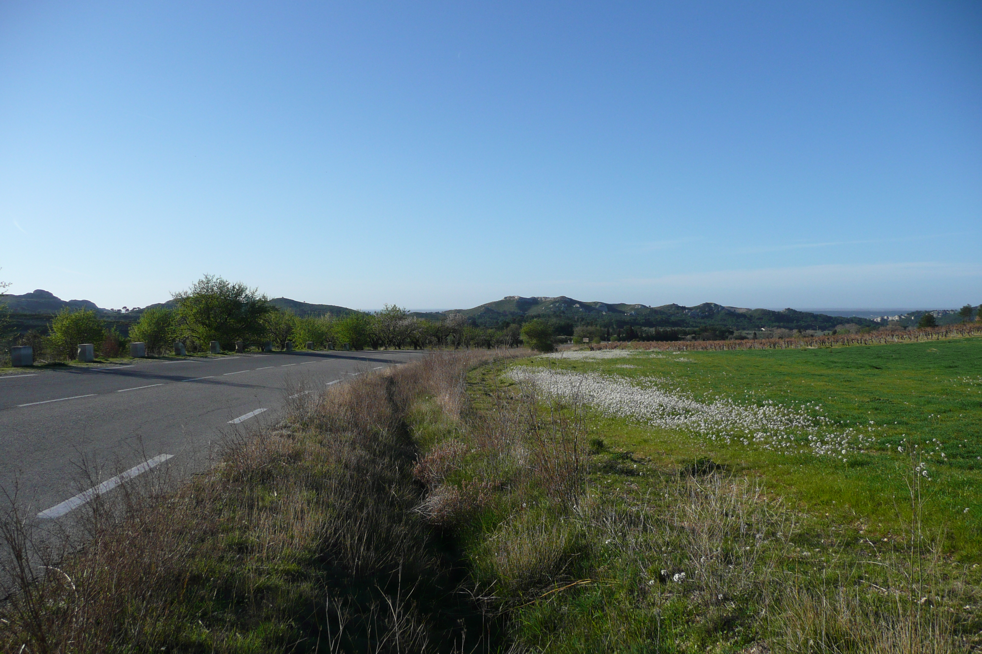 Paysage près de Maussane les Alpilles.